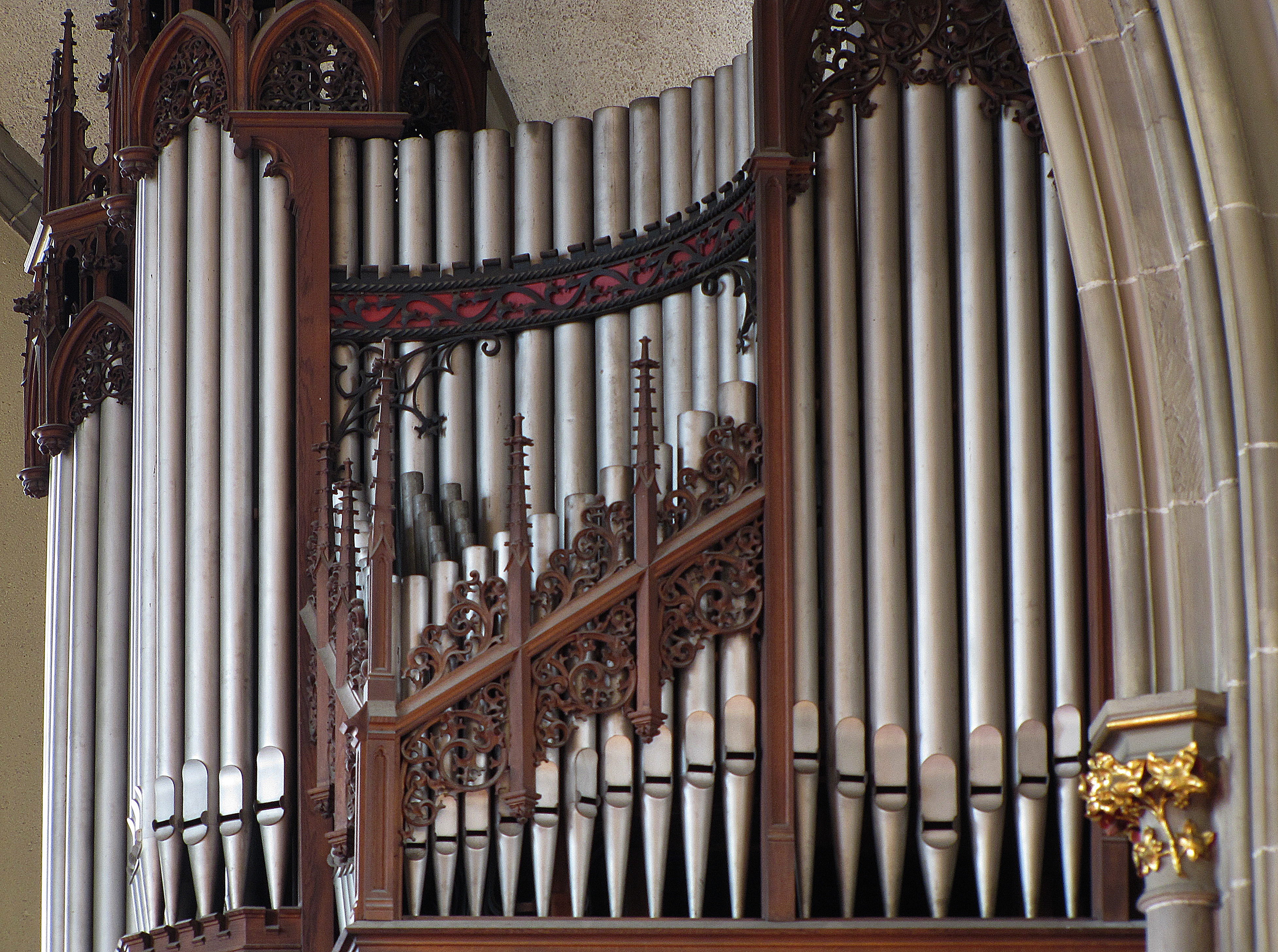 Alsace, Bas-Rhin, Église catholique Saint-Maurice (1899) de Strasbourg, avenue de la Forêt-Noire. Orgue Friedrich Weigle (1899). This object is classé Monument Historique in the base Palissy, database of the French furniture patrimony of the French ministry of culture, under the references PM67000776, buffet PM67000977 buffet and instrument PM67000977 instrument.